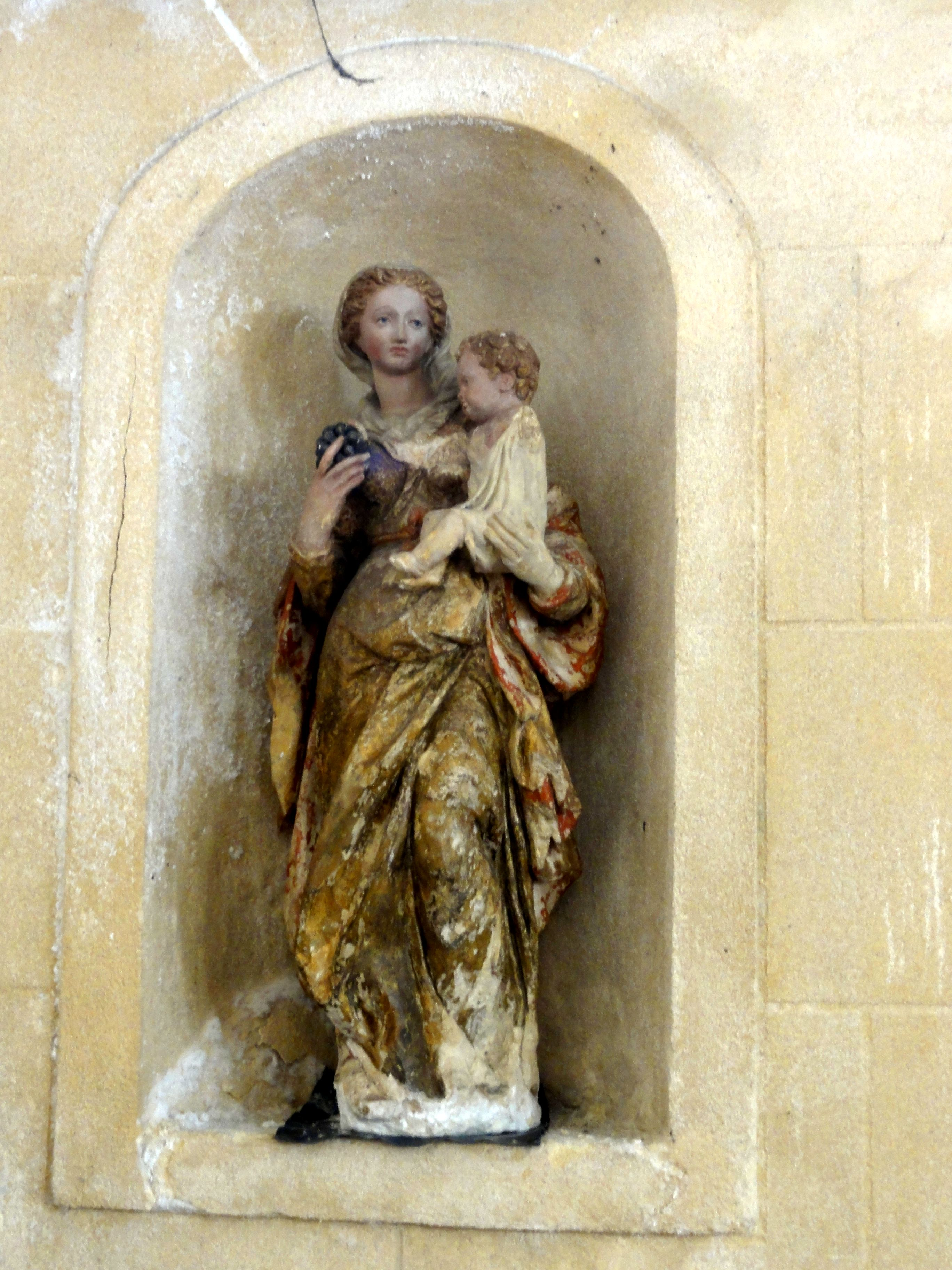 Vierge à l'Enfant dans le bas-côté nord.